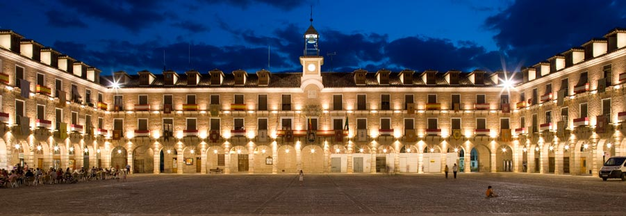 Plaza Mayor de Ocaña (Toledo).